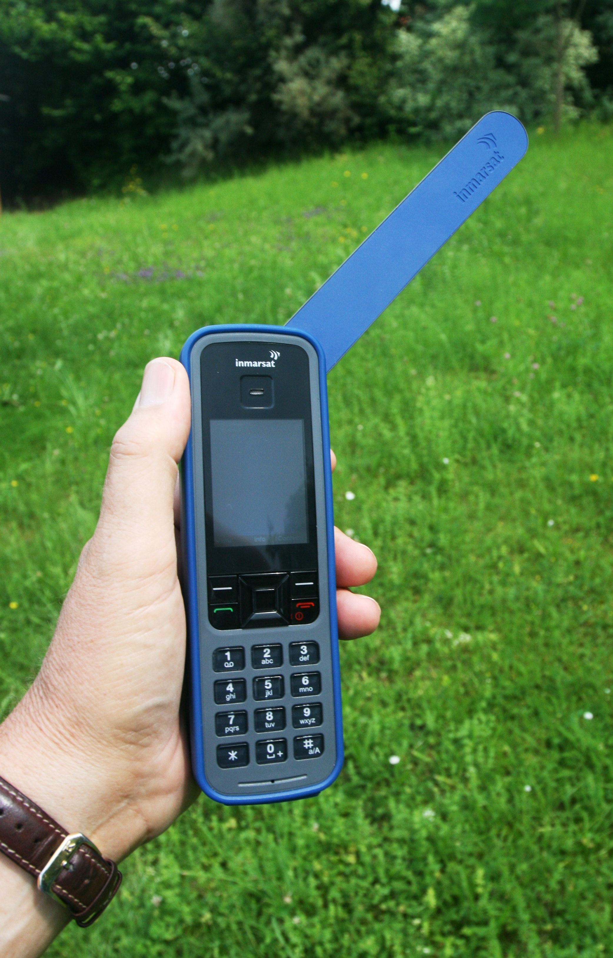 Satelliten-Handy "IsatPhone Pro" des Netzbetreibers Inmarsat